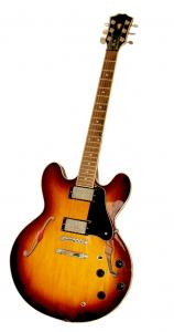 Guitare électrique, corps creux et deux micro humbucker, cette guitare est surtout représentative des milieus blues de la guitare electrique, mais il existe de nombreux modéles beaucoup plus connus et plus représentatifs de la guitare electrique tel que la mythique Fender stratocaster, ainsi que l'Epiphone Les Paul, ou encore la Sg célèbre grâce au groupe AC/DC... statut You may use any of the photos in our system free of charge for any commercial or personal design work if you obey the specified restrictions concerning each photo you download. Pour celle-ci : There are no usage restrictions for this photo